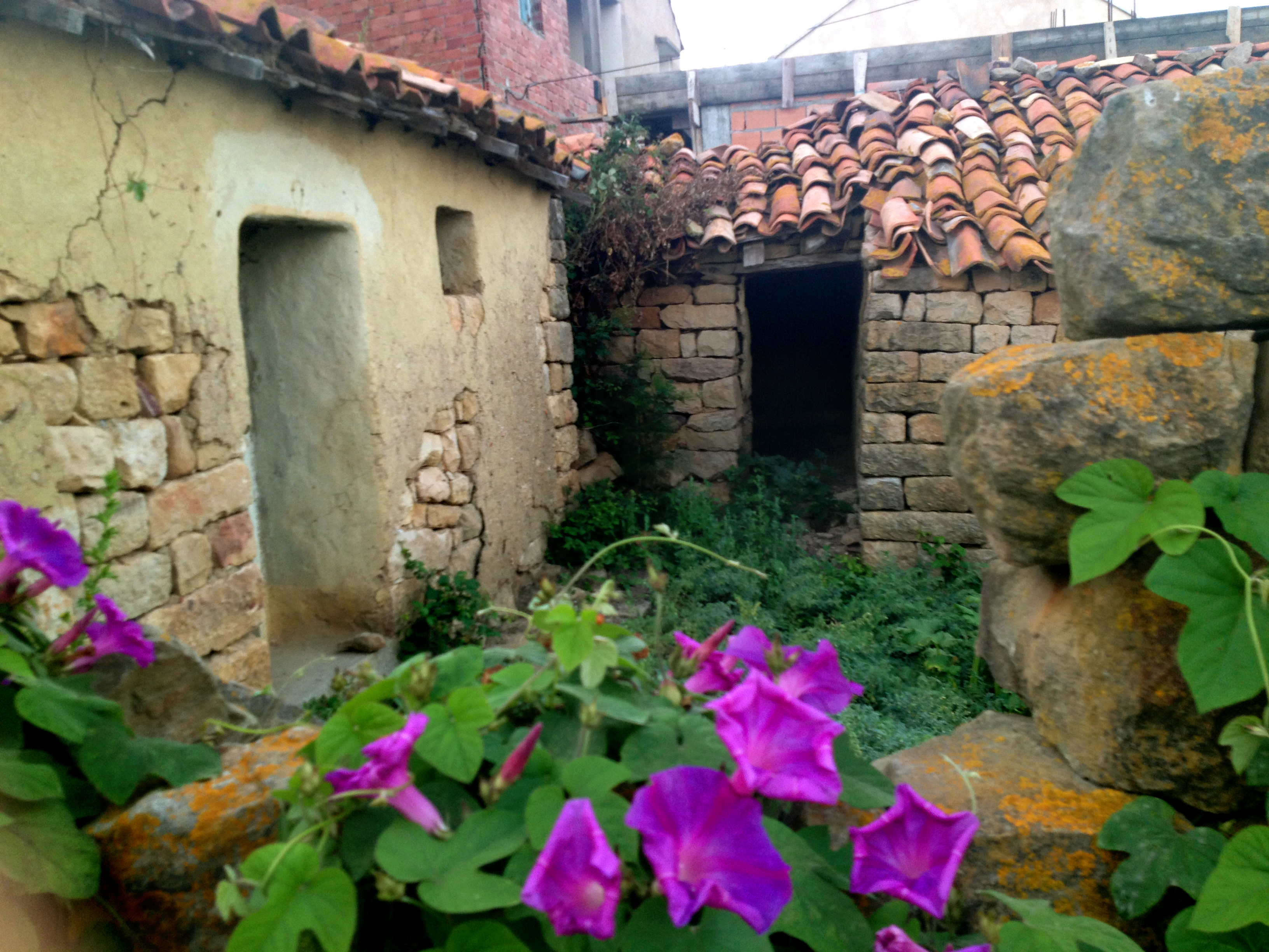 village traditionnel de taksebt Tigzirt